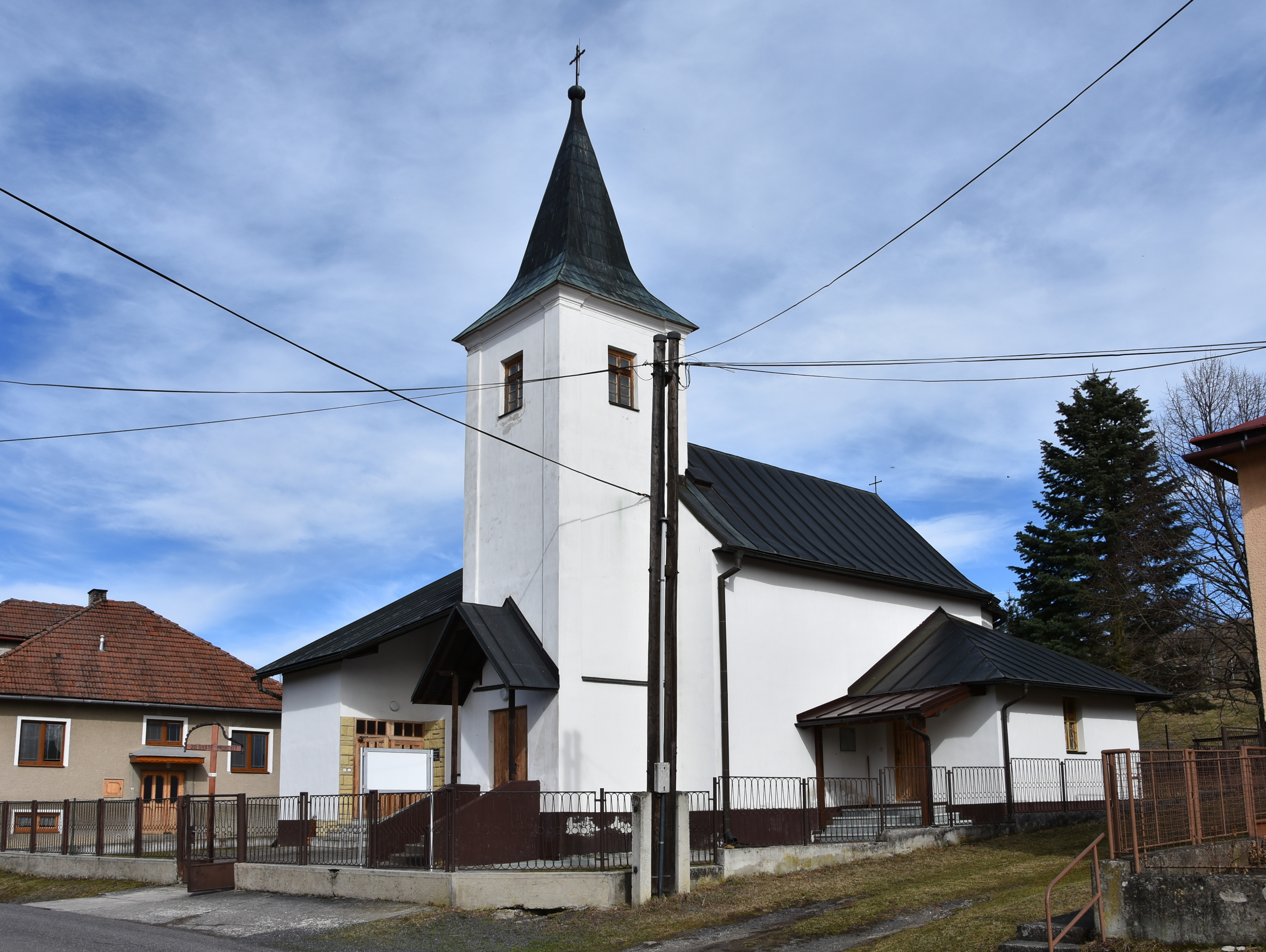 Pavlova Ves, okres Liptovský Mikuláš, Slovensko - rímsko-katolícky kostol sv. Petra a Pavla; vybudovaný začiatkom 30-tych rokov 20. storočia